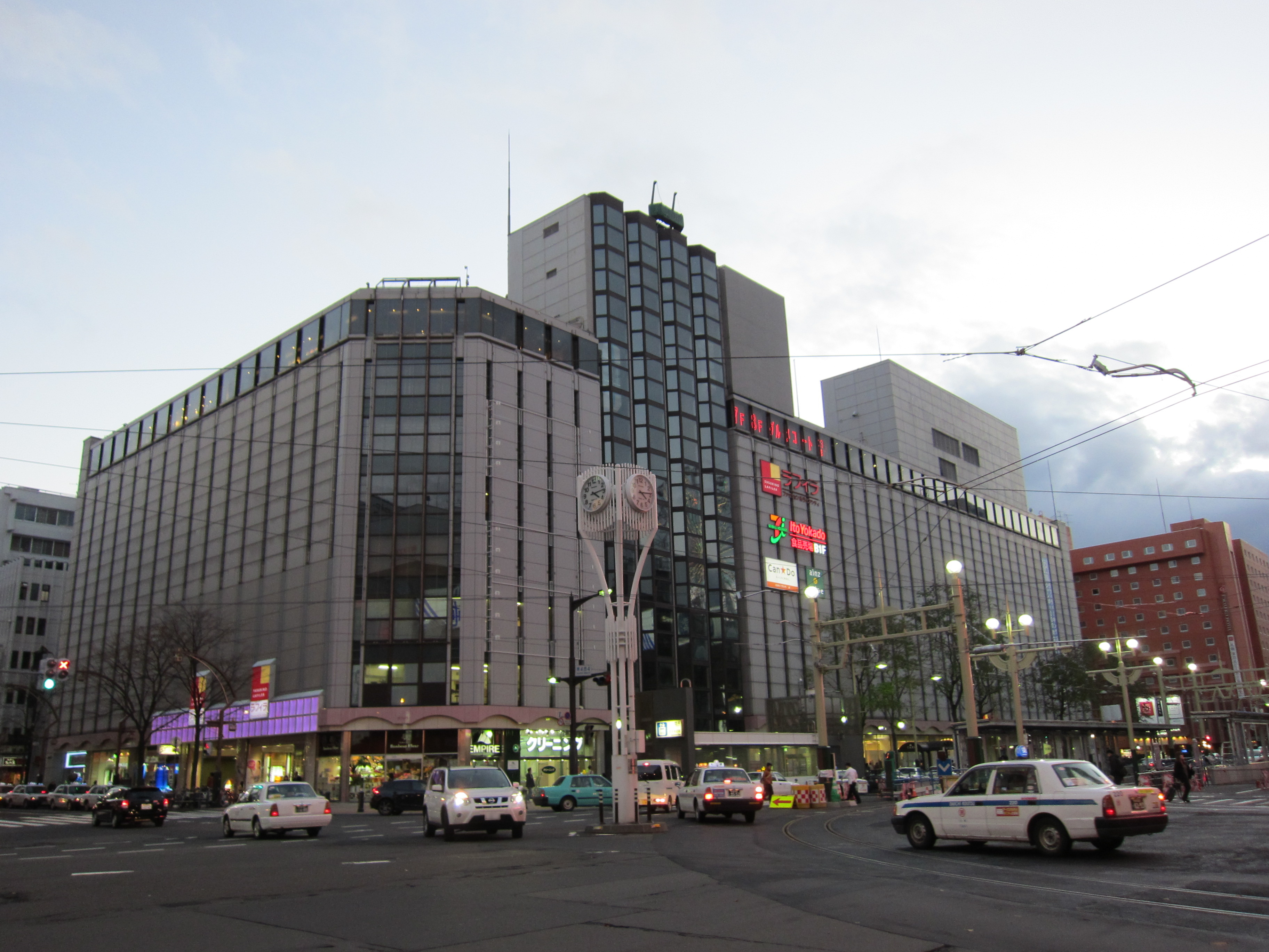 札幌市にある商業施設「ススキノラフィラ」。旧、札幌松坂屋、ヨークマツザカヤ、ロビンソン札幌。